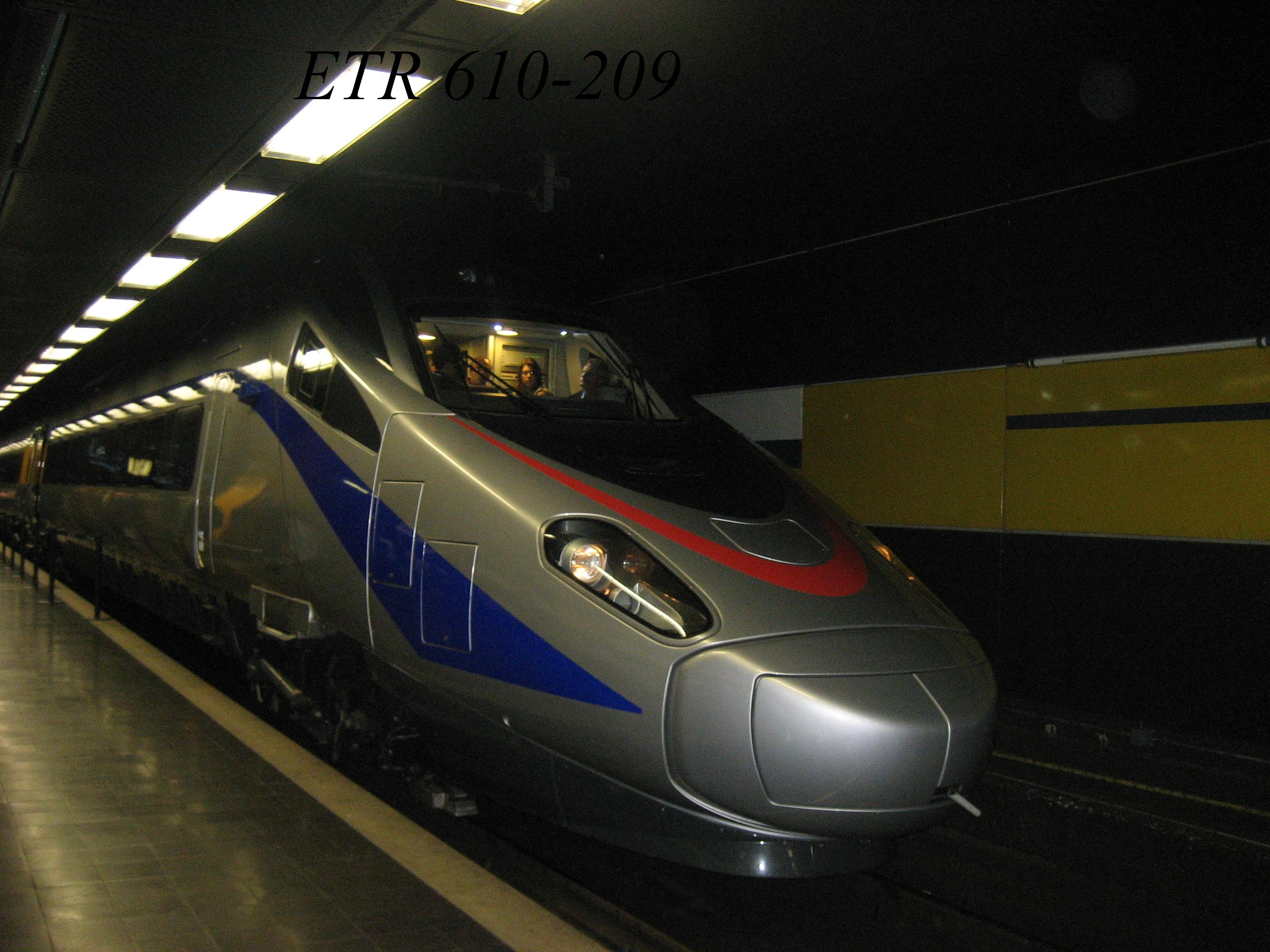 Etr 610 della società Cisalpino S.A.